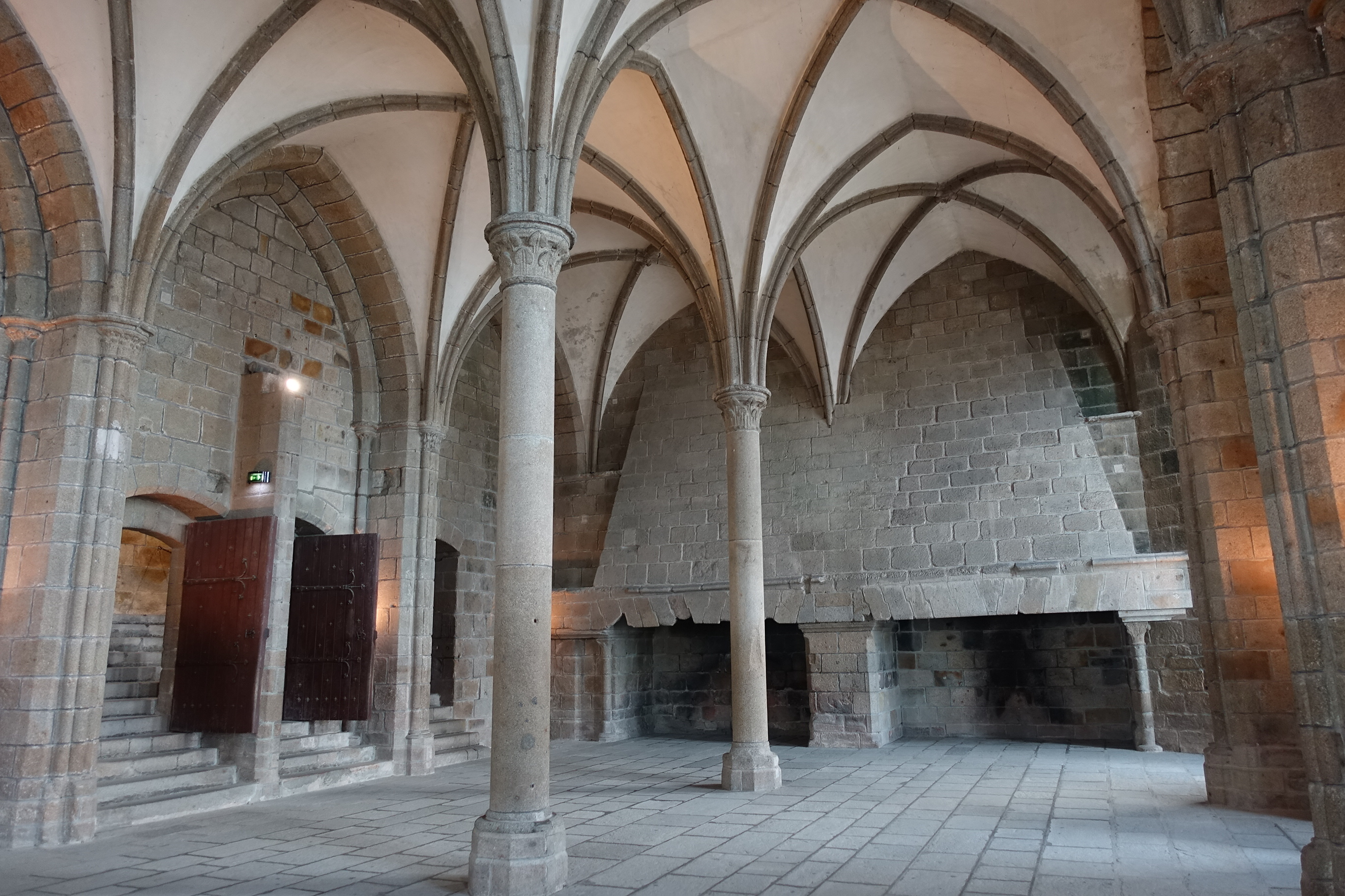 Salle des Hôtes, mont Saint-Michel.